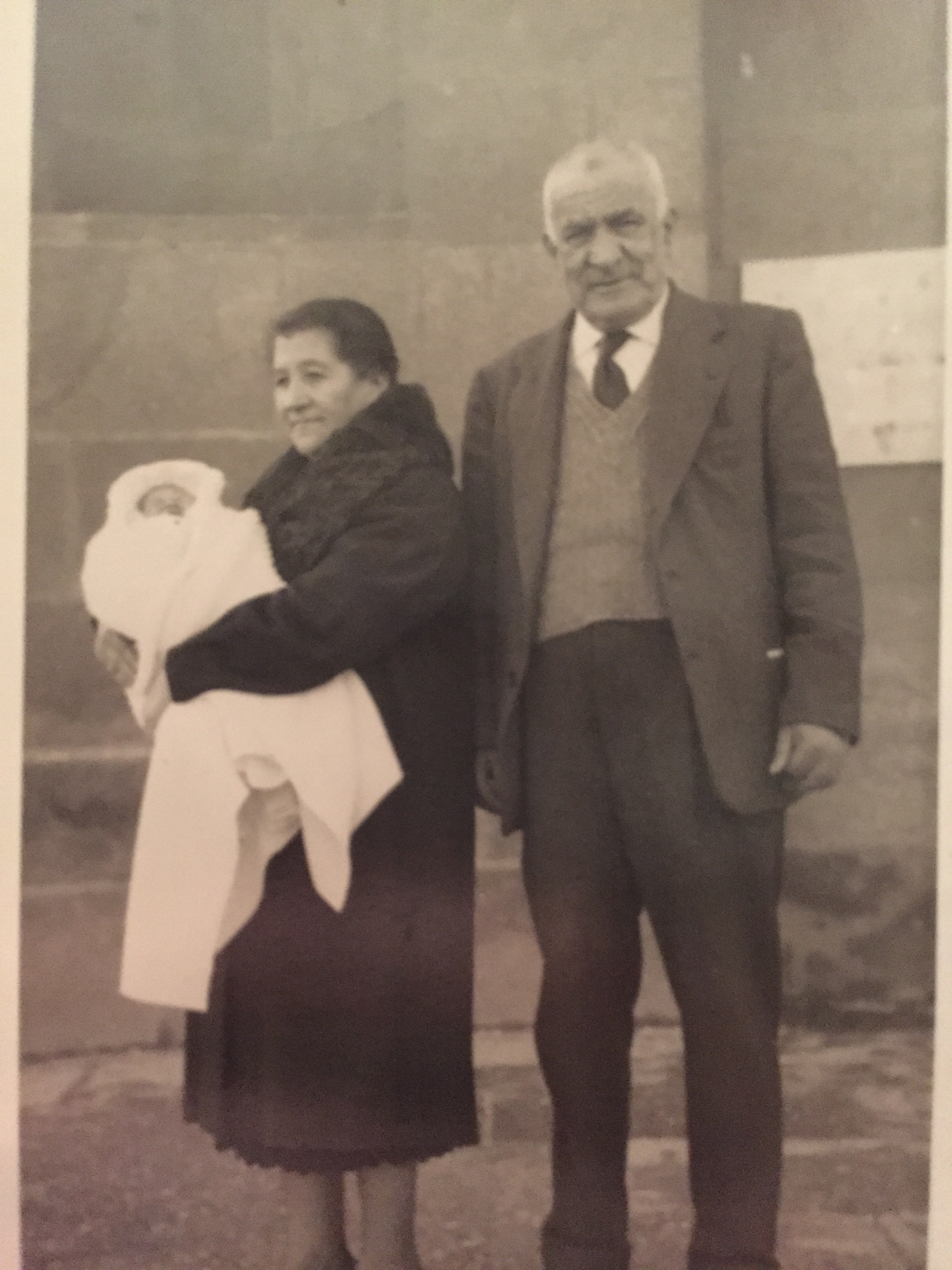 El alcalde y su mujer